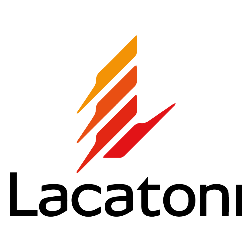 Logotipo Lacatoni